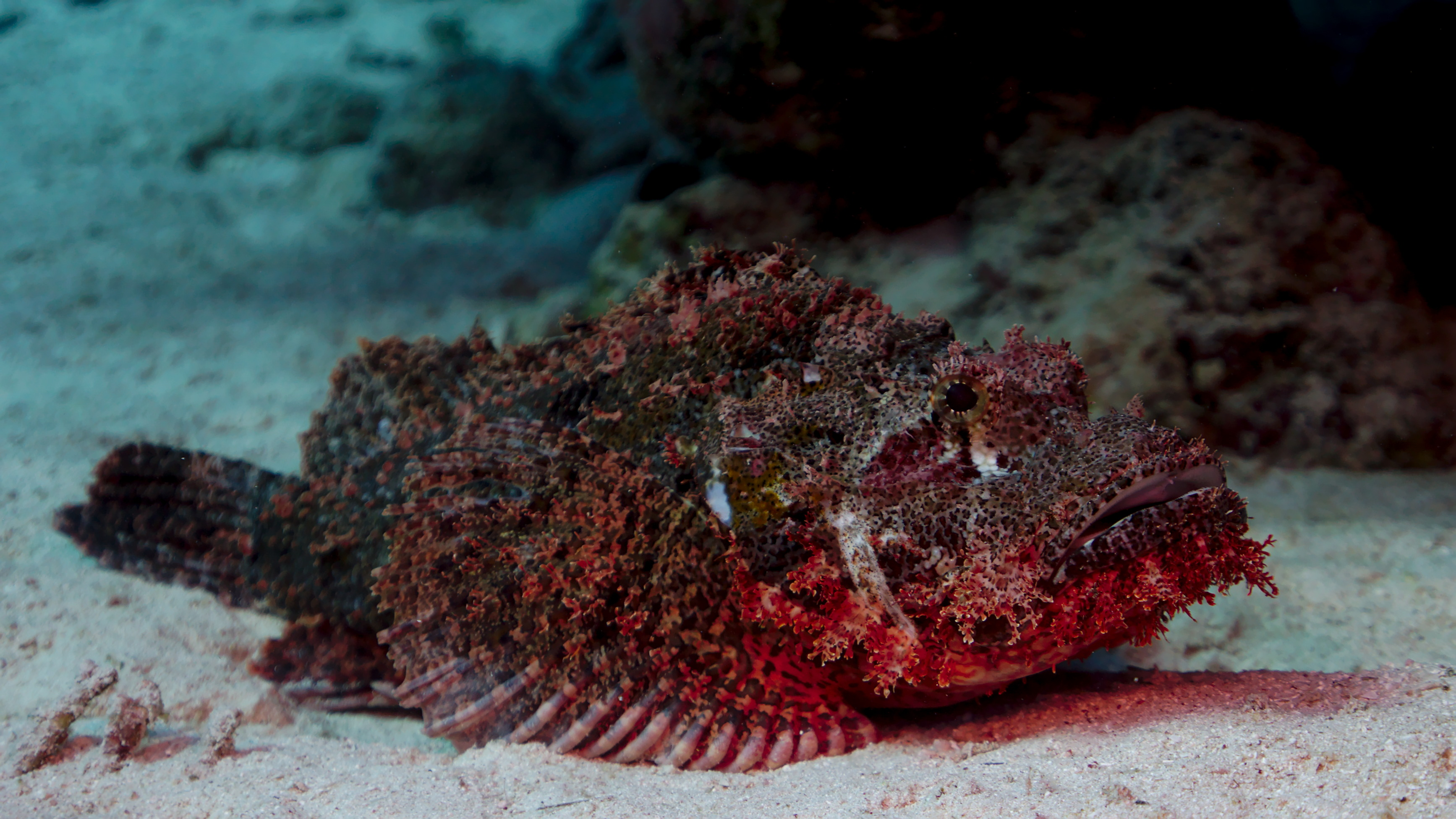 Poisson brun rouge foncé. Il a des appendices charnus sous le menton.